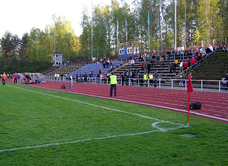 Vuosaaren urheilukenttä